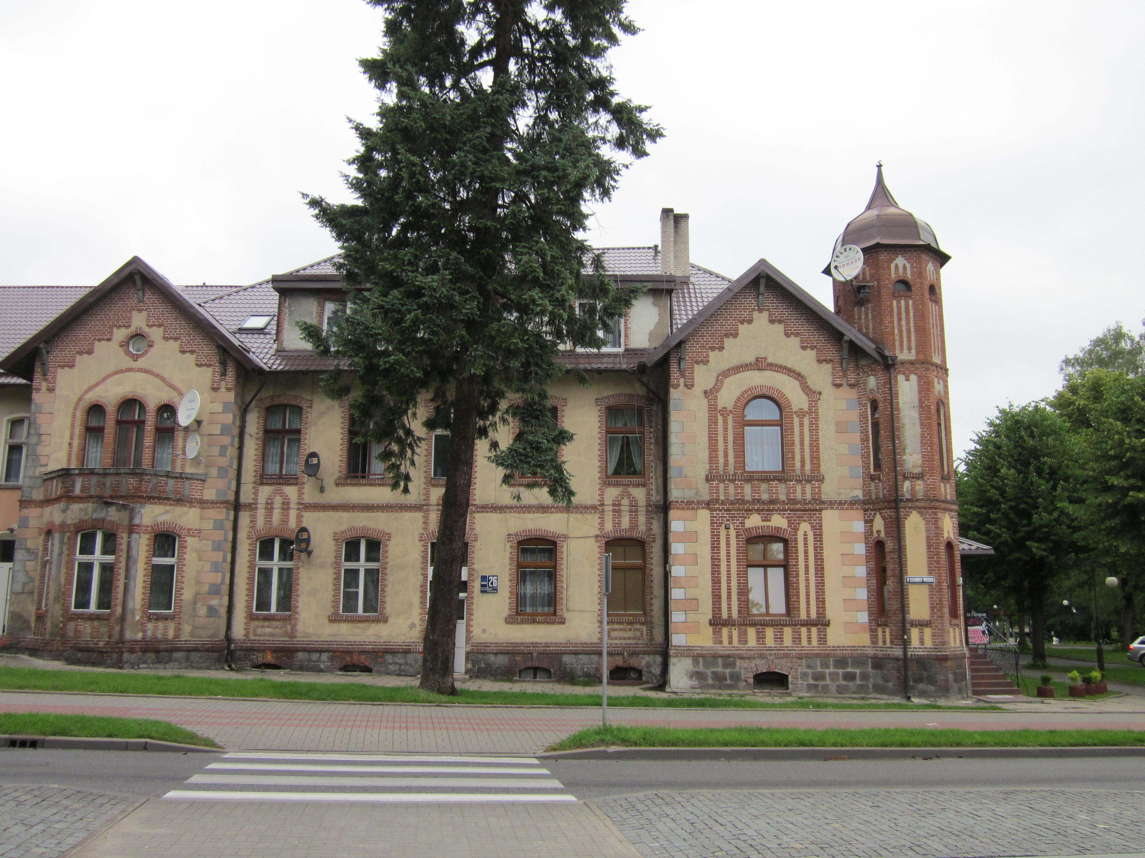 Miastko, uö. Kazimierza Wielkiego 26 (róg ul. Grunwaldzkiej) - dom mieszkalny